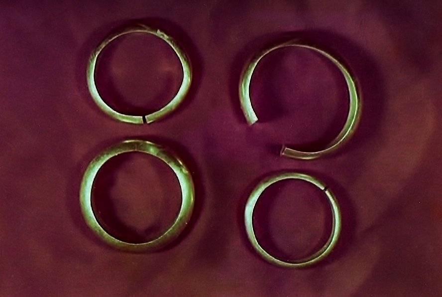 Brazaletes número 2, 3, 4 y 5 del Tesoro de Villena.